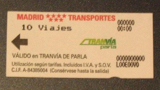 Billete Tranvia Parla